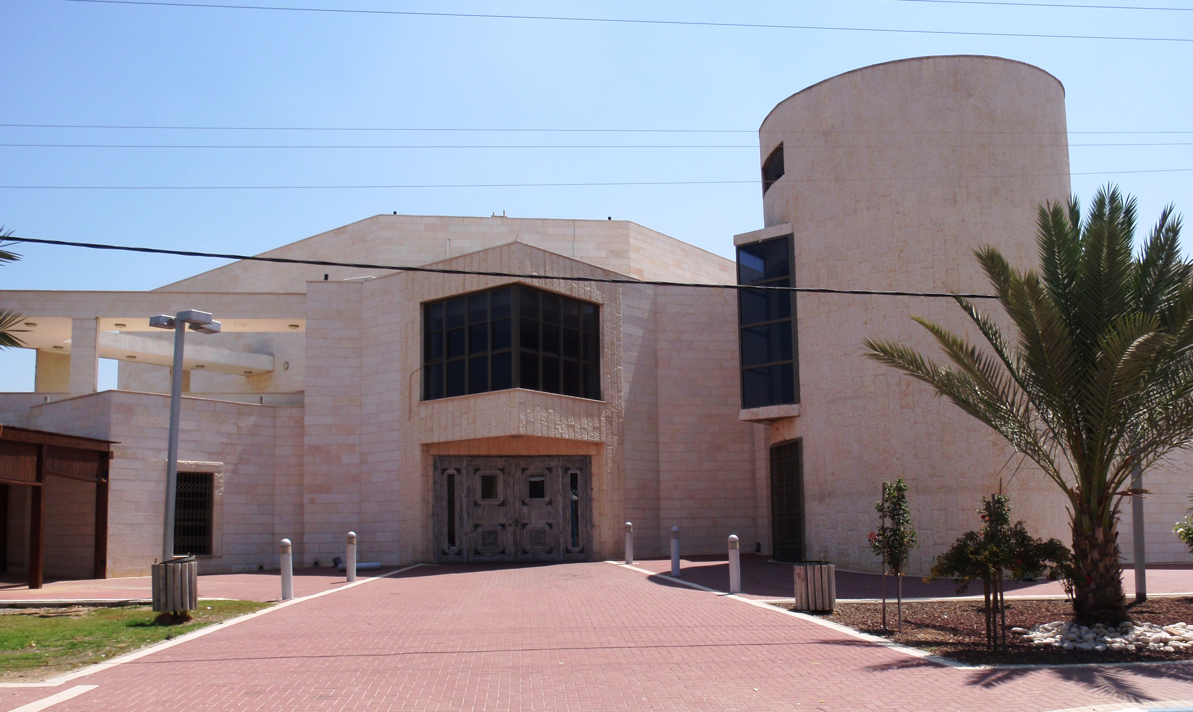 Moshavim בית הגדי בית הכנסת החדש